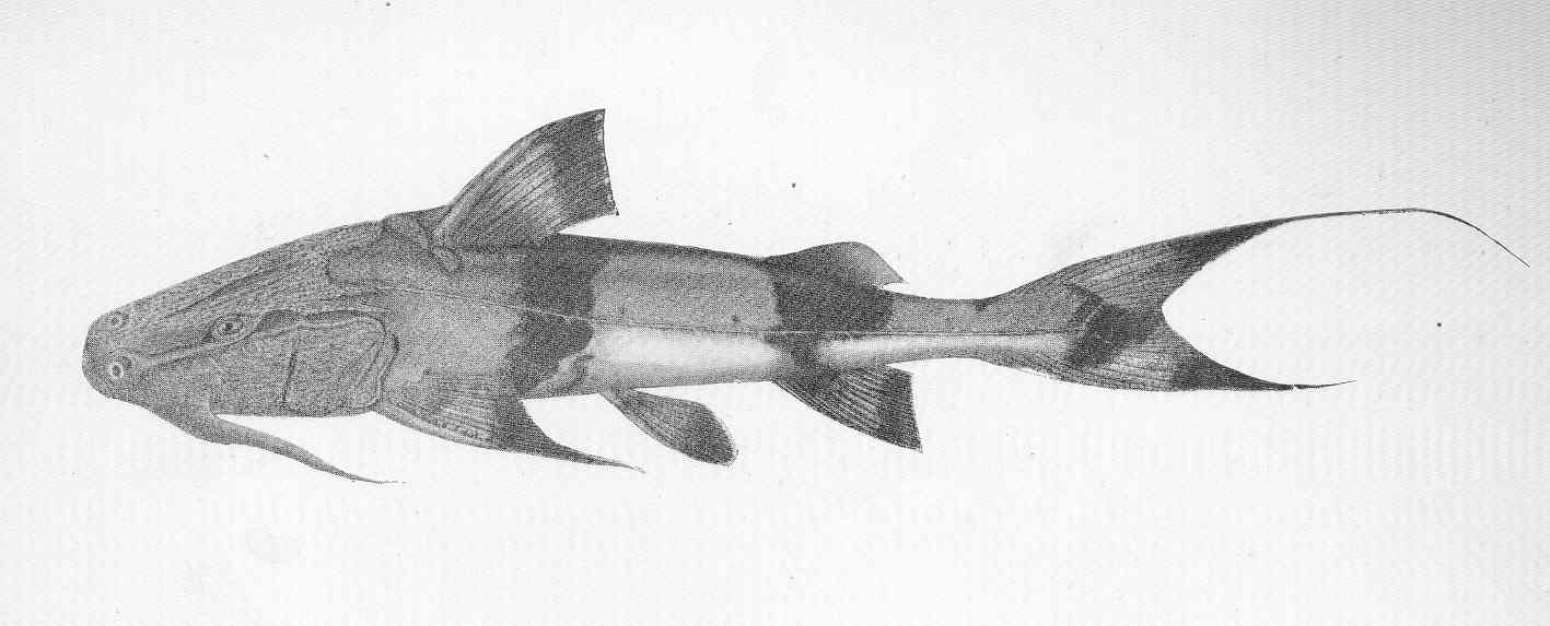 Bagarius yarrelli (Sykes, 1839)